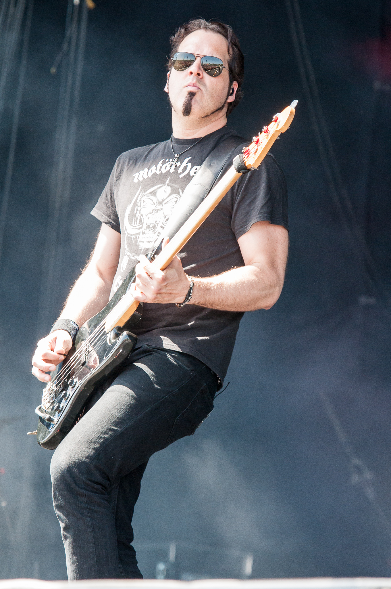 ARGO-Konzerte,Centerstage,Konzert,Livekonzert,Livemusik,Mark Damon,Musik,RiP,Rock im Park 2014,The Pretty Reckless